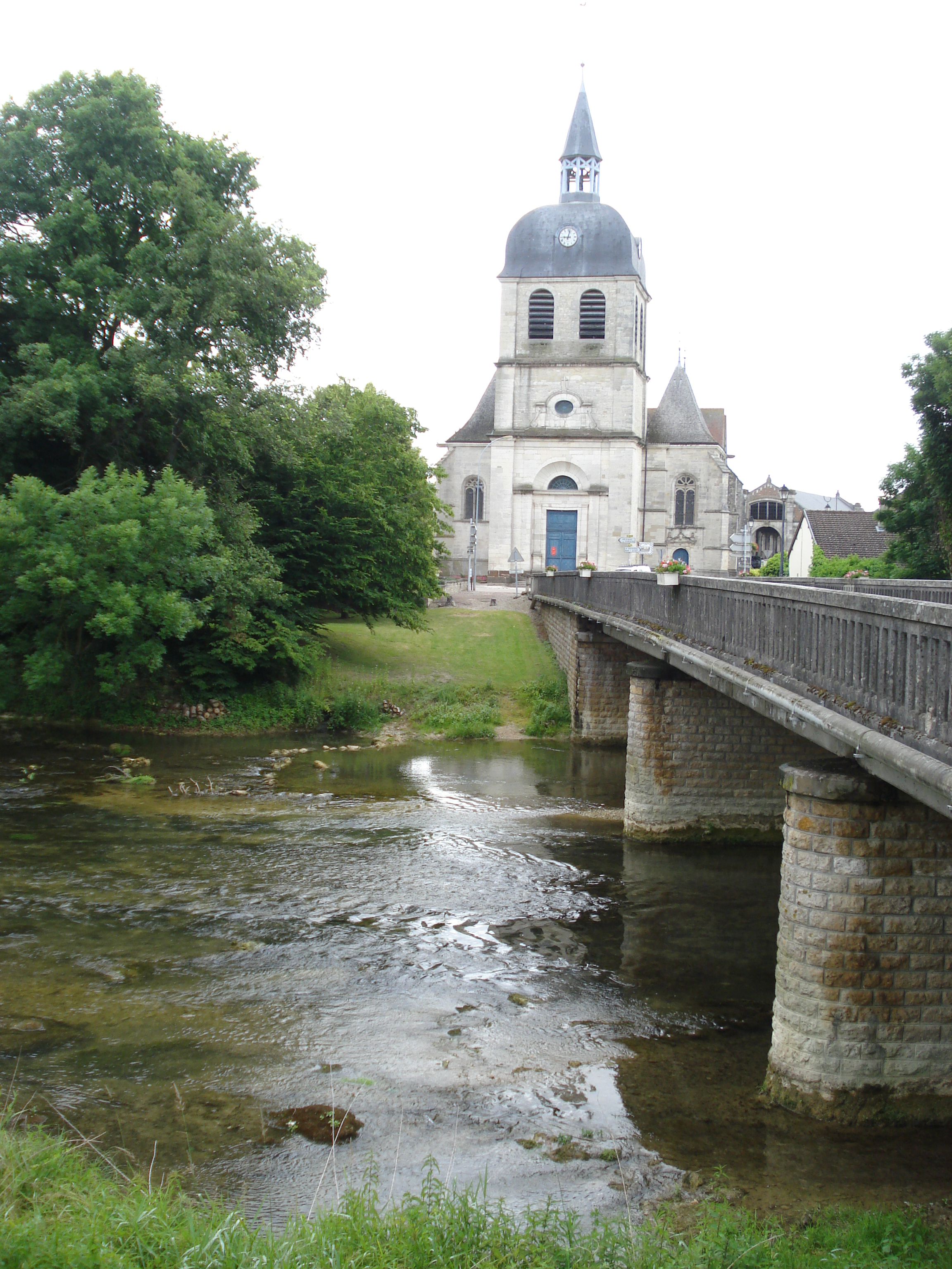 Dienville, l'église et le pont sur l'Aube.JPG